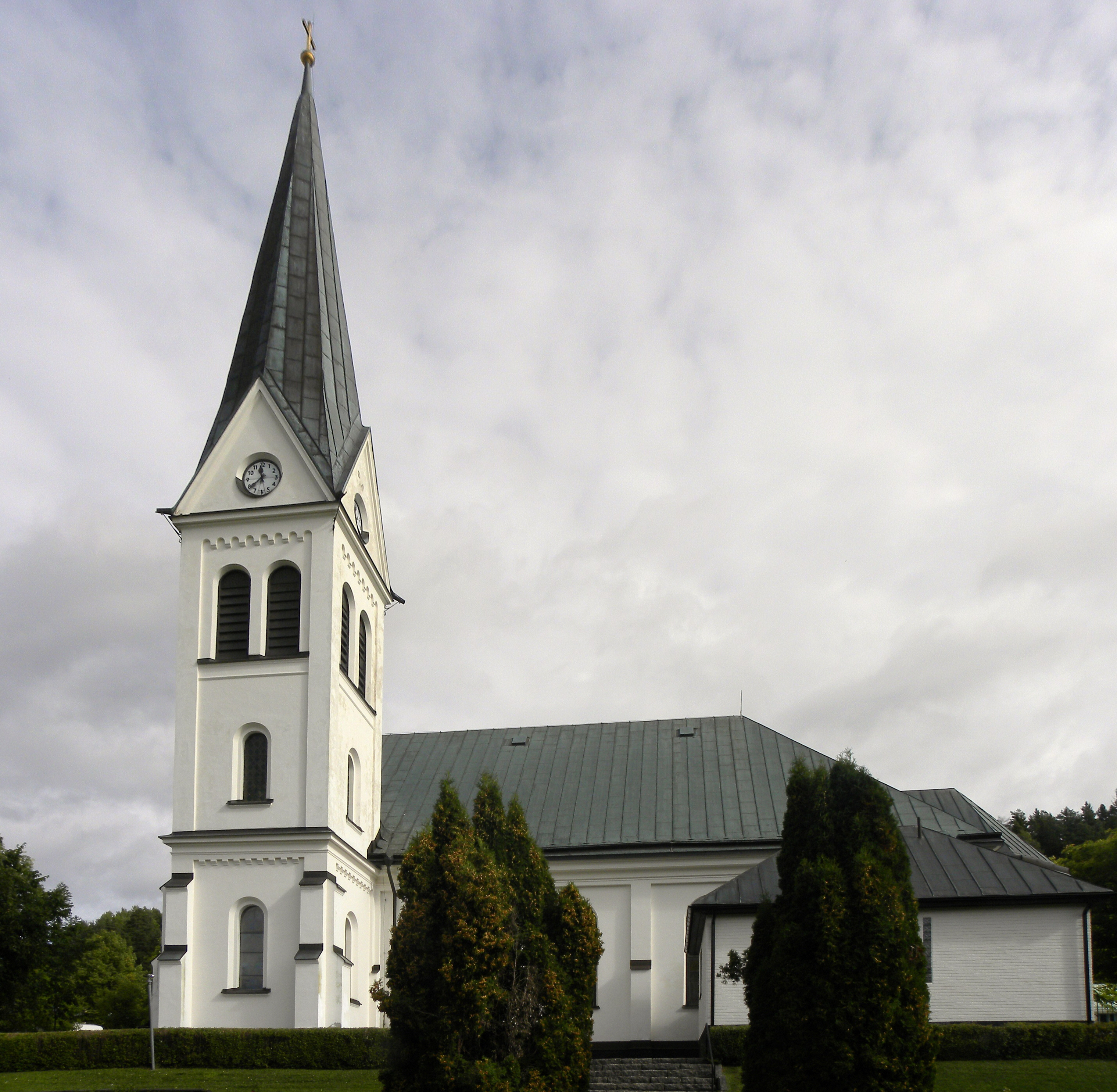 Kirche von Valdmarsvik